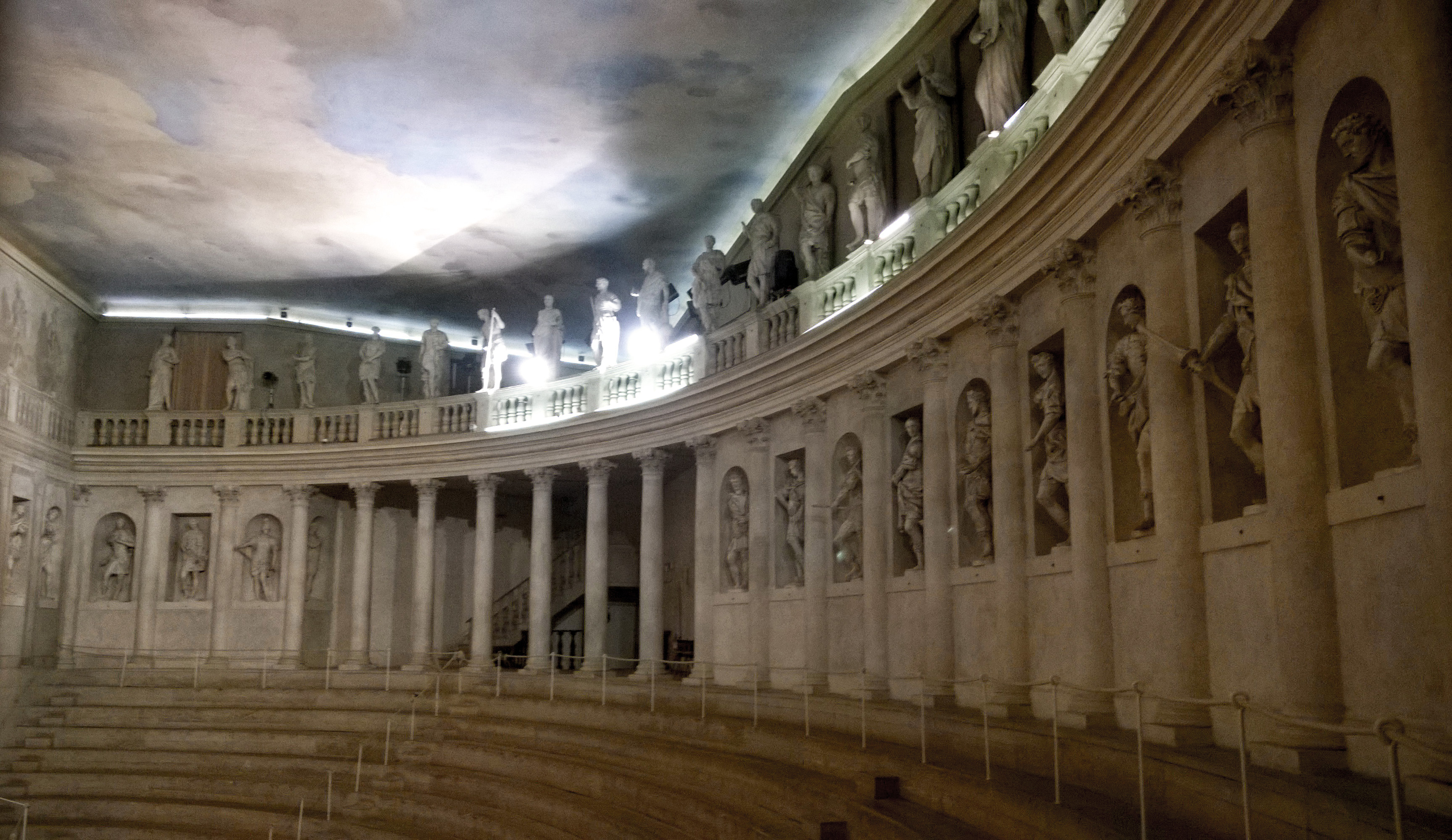 Vista della loggia e del soffitto affrescato This is a photo of a monument which is part of cultural heritage of Italy.